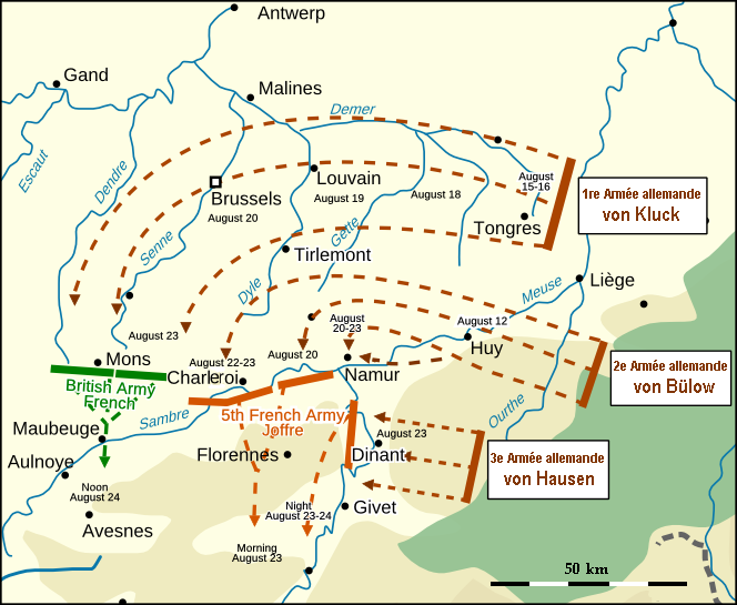 Avance de l'Armée allemande à travers la Belgique, août 1914